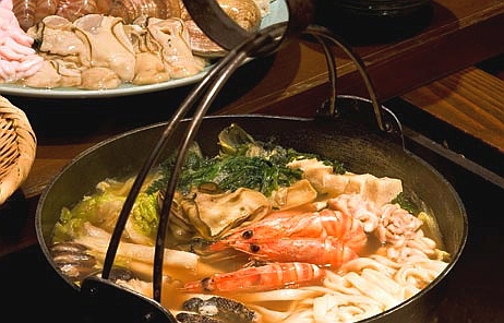 南部はっと鍋。日本の南部地方の伝統料理。「はっと」という幅広い小麦麺のようなものを入れるのが特徴。